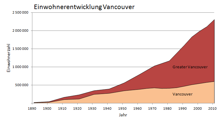 Einwohnerentwicklung von Vancouver und Greater Vancouver zwischen 1891 und 2011